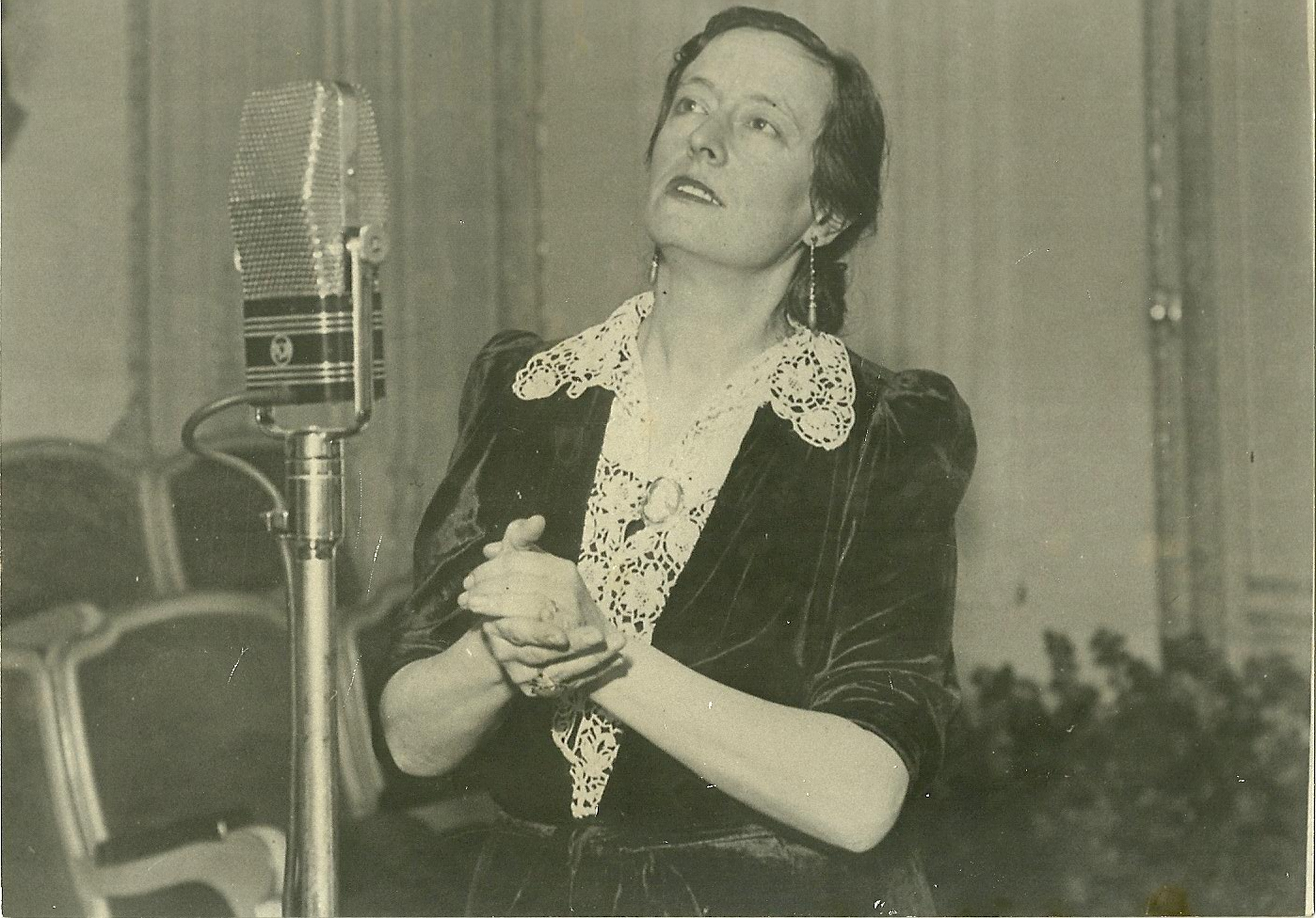 Conxita Badia en un concert europeu el 1939. FONT: ARXIU CONXITA BADIA